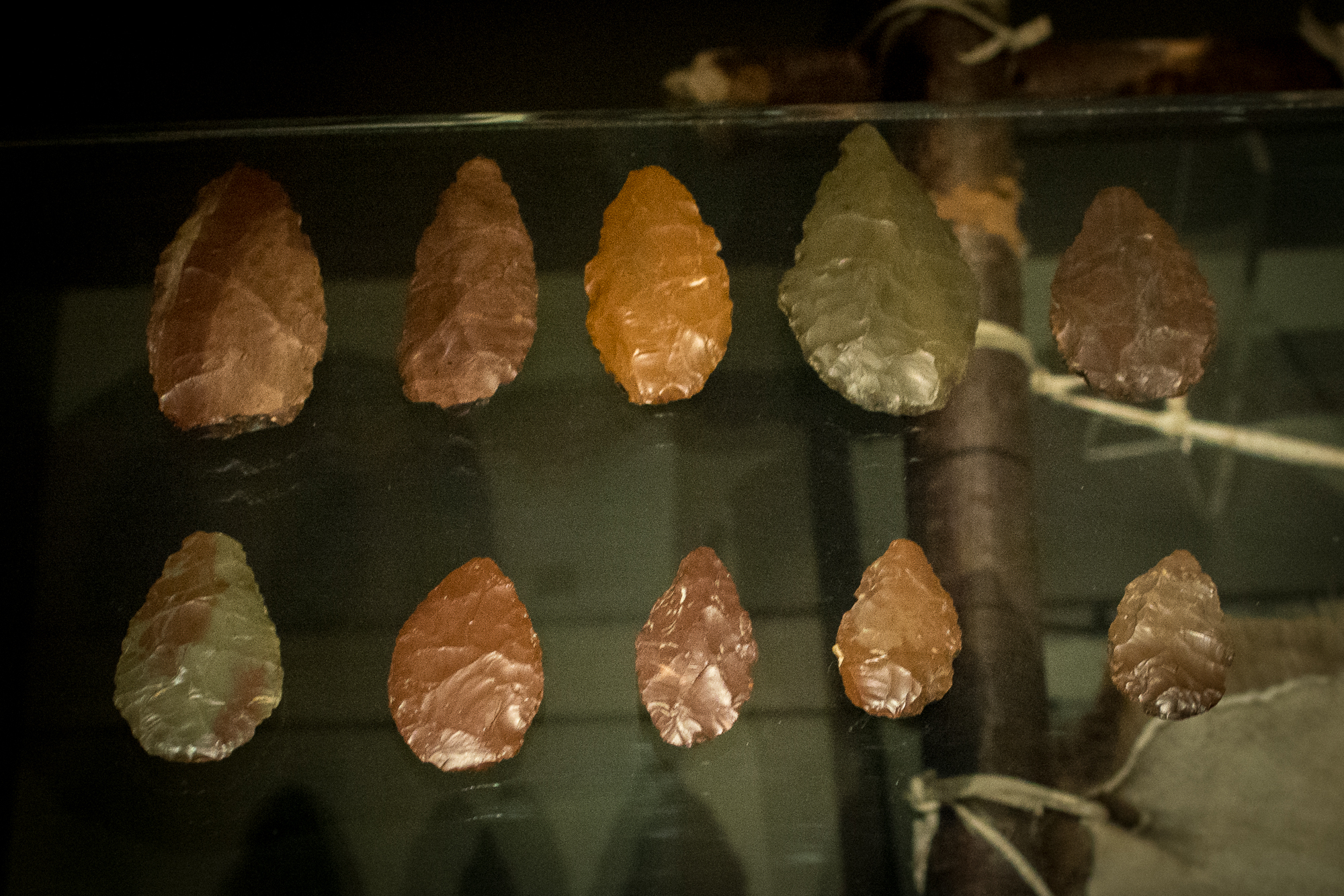 Blattspitzen aus der Jankovich-Höhle, ausgestellt im Ungarischen Nationalmuseum in Budapest.